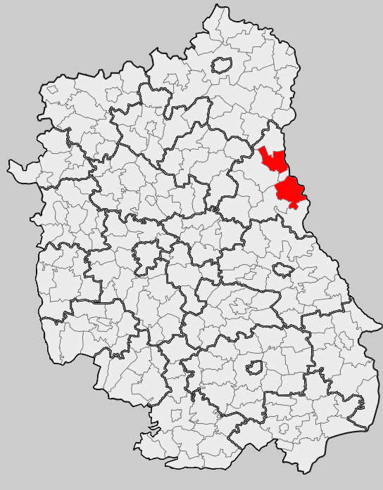 Map of gmina Włodawa (rural), Włodawa county, Lublin voivodship Mapa gminy Włodawa (wiejska), powiat włodawski, województwo lubelskie